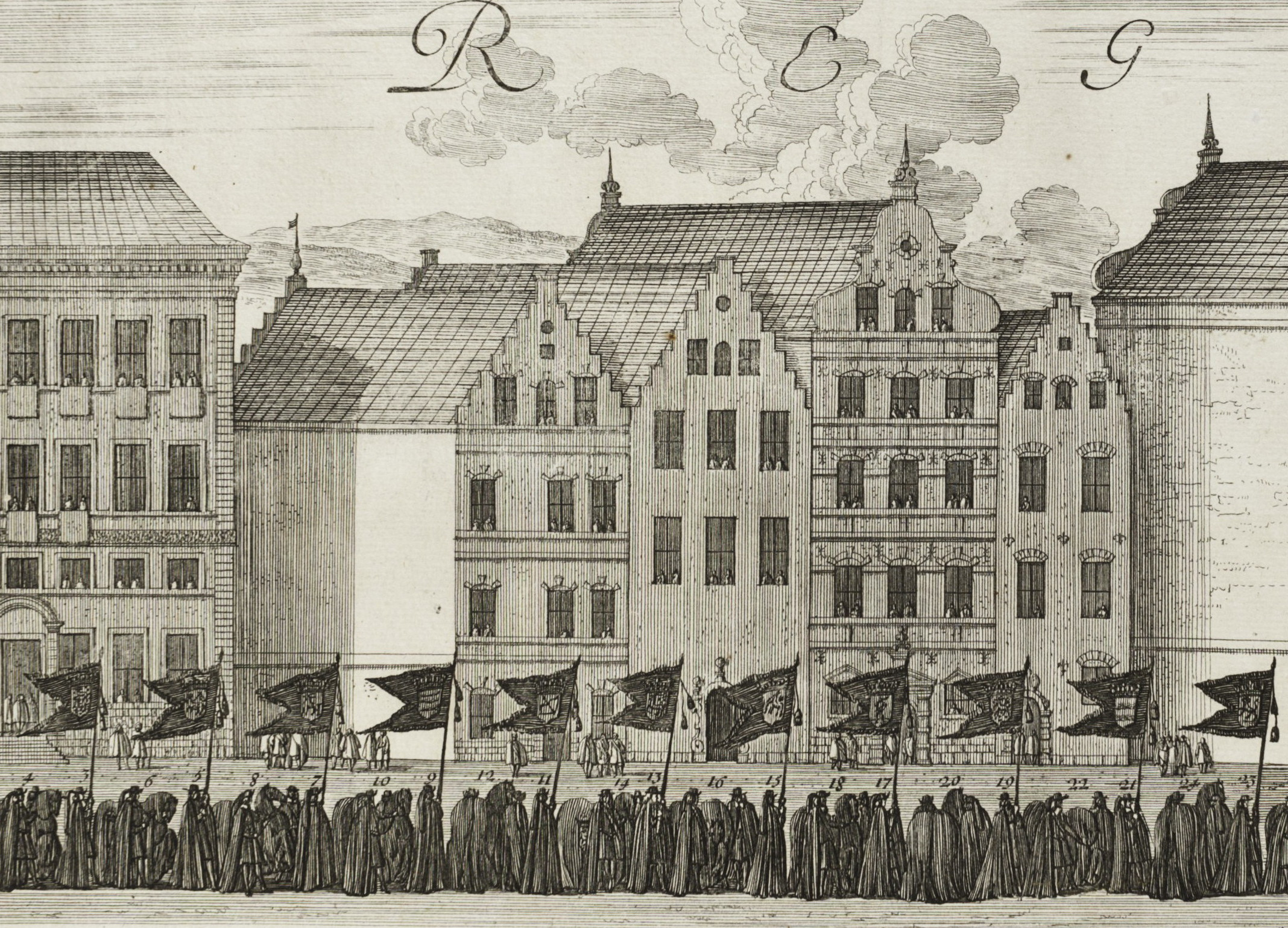 Kopparstick med motiv från Karl X Gustavs begravningståg den 4 november 1660, graverat av Jean Le Pautre efter teckning av Erik Dahlbergh, visande Stora Nygatans byggnader i kvarteret Tritonia